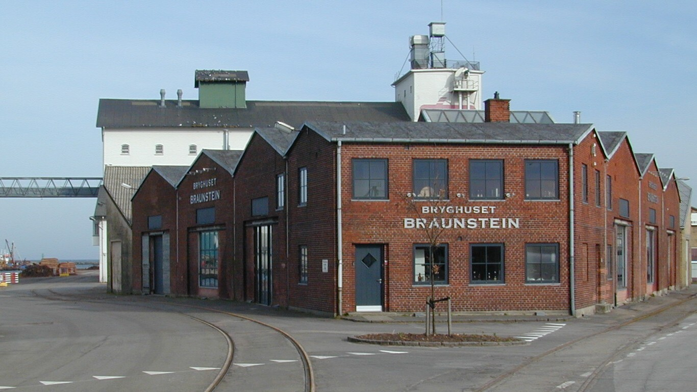 Bryghuset Braunstein, Køge havn